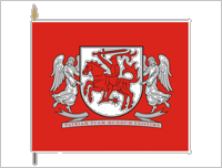 Aukstaitija flag